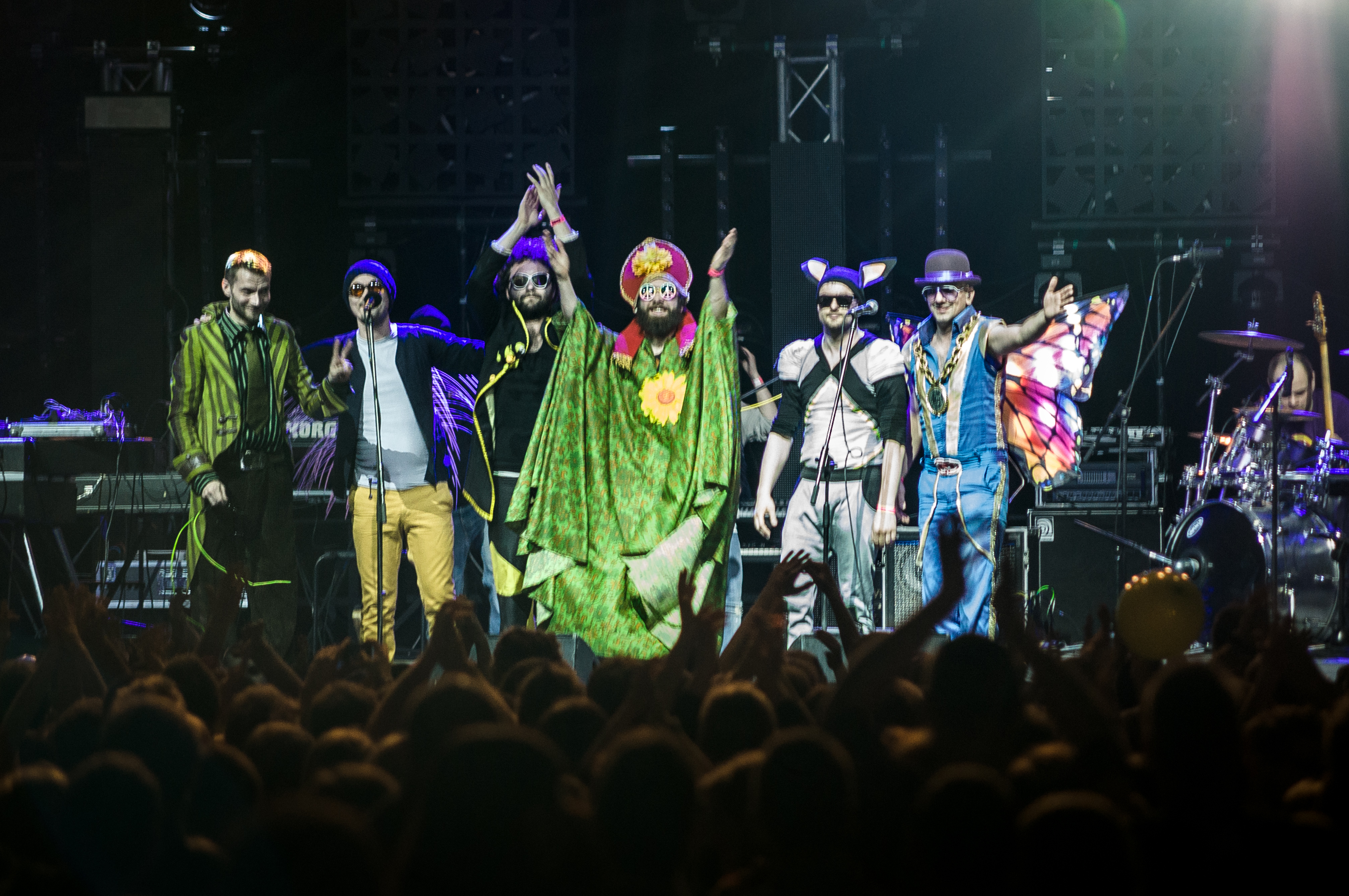 Zespół Łąki Łan podczas koncertu na Rocket Festiwal 2013.